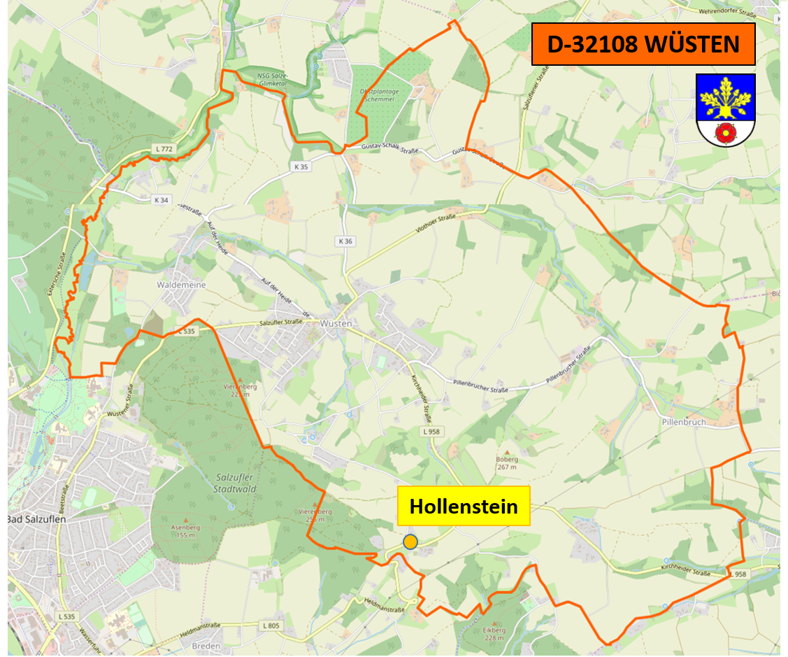 Deutschland (D) - Nordrhein-Westfalen (NW) - Kreis Lippe (LIP) - Bad Salzuflen - Wüsten: Ortsteil 'Hollenstein', Lage im Ortsgebiet